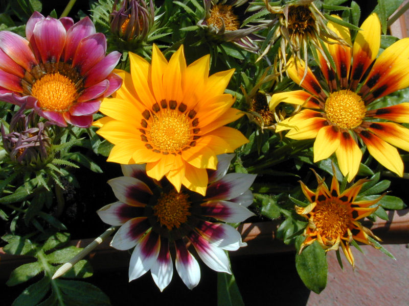 gazania